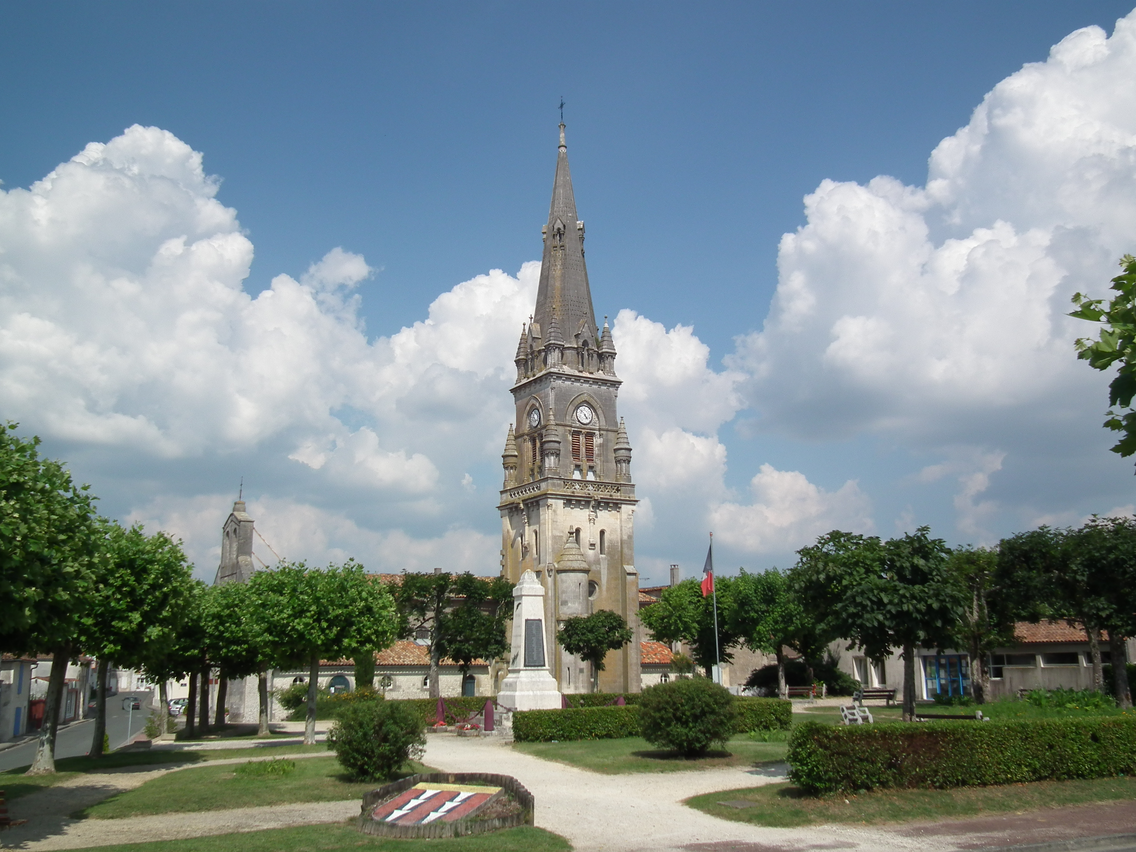 Le centre-ville d'Archiac